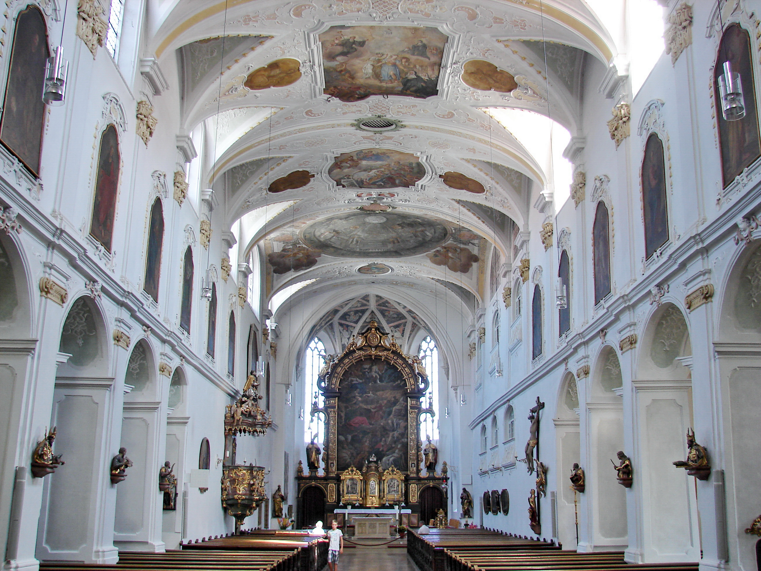 Stadtpfarrkirche mit ihren beiden Türmen - dem gedrungenen romanischen „Stifterturm“ und dem durch einen um mehrere Stockwerke 1727–1730 überhöhten Aufbau in Renaissancestil mit Zwiebelkuppel.